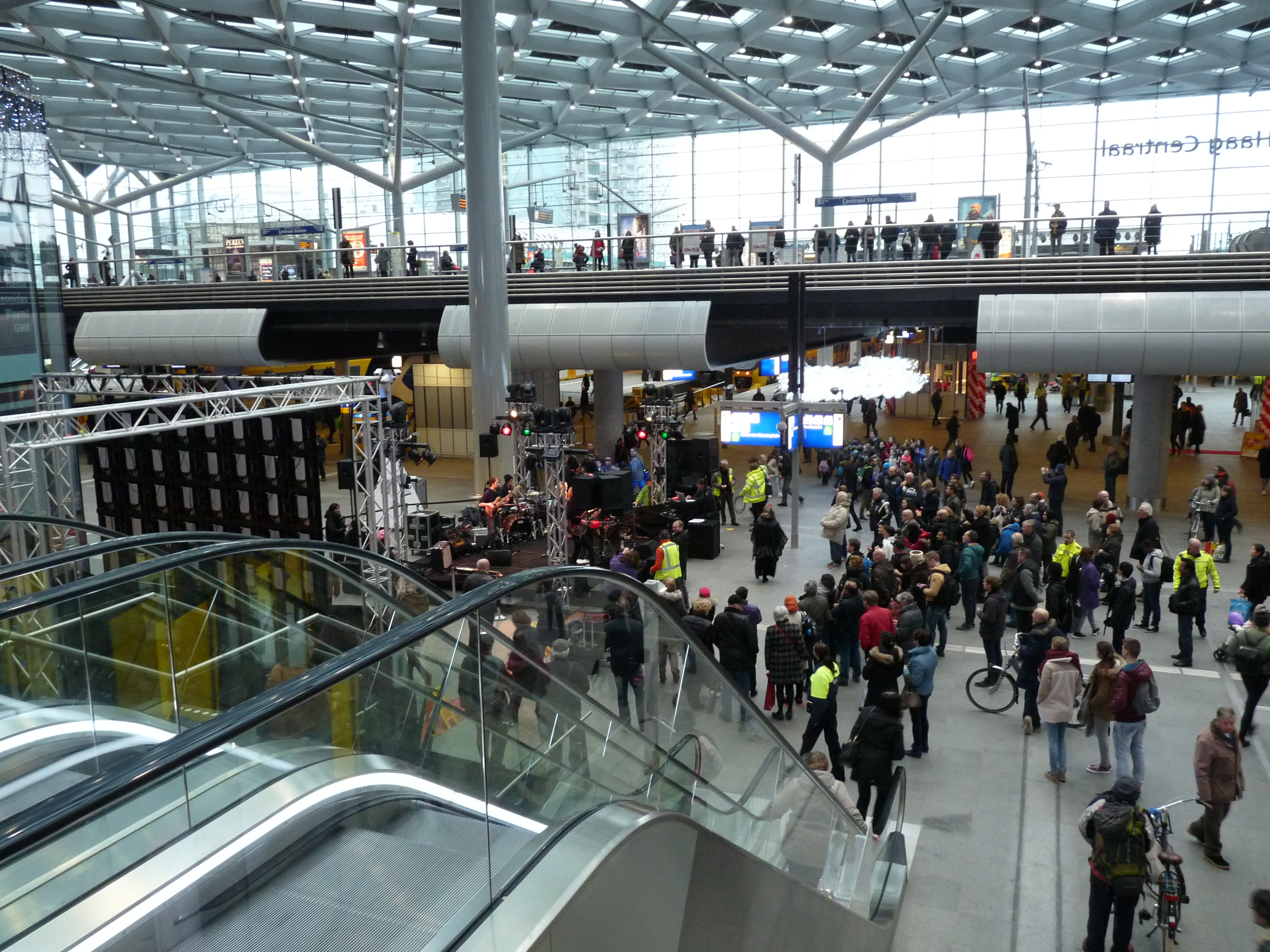 De feestelijke opening van het Centraal station op 1 februari 2016 met een orkest